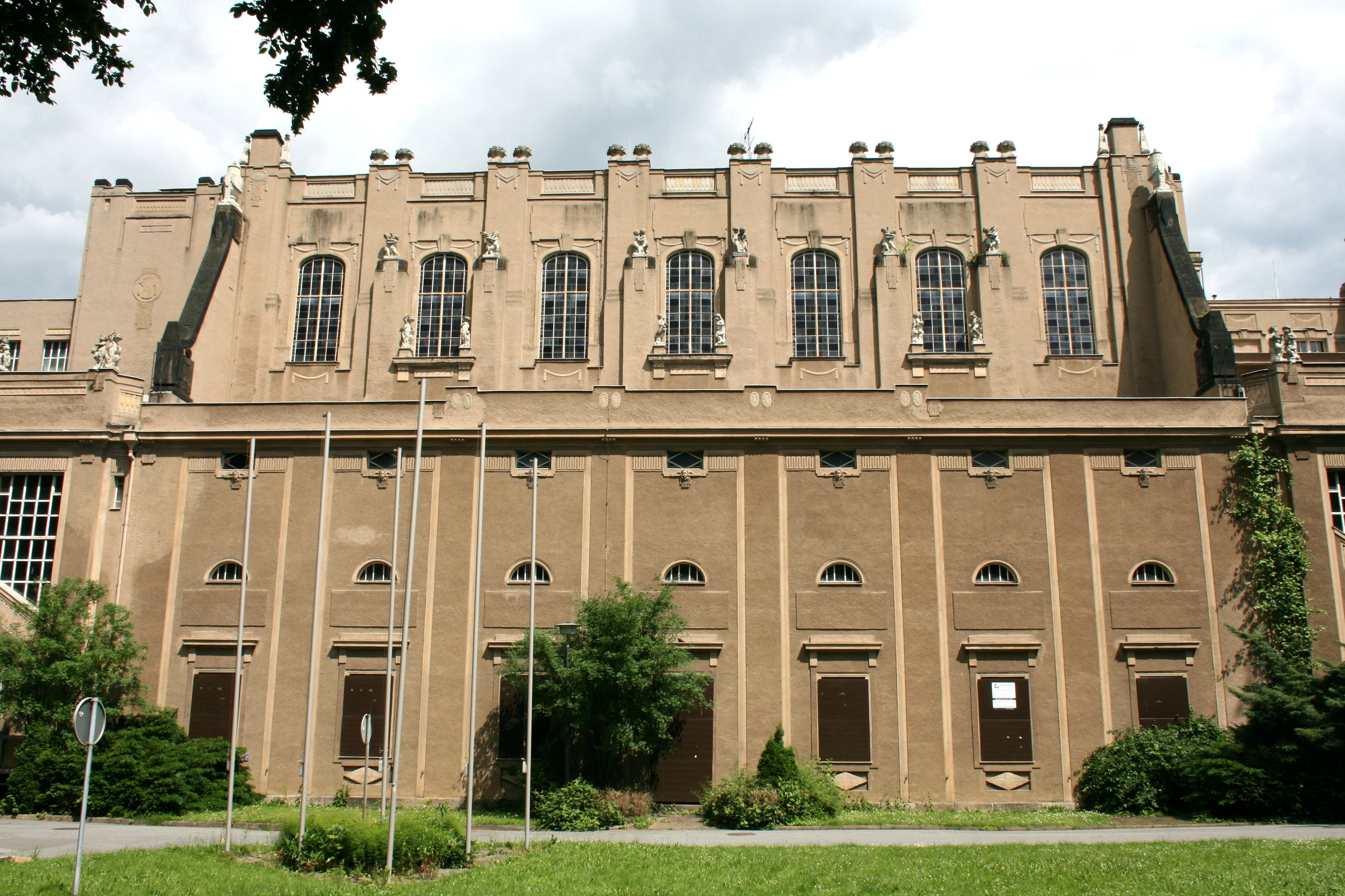 Stadthalle, Am Stadtpark in Görlitz